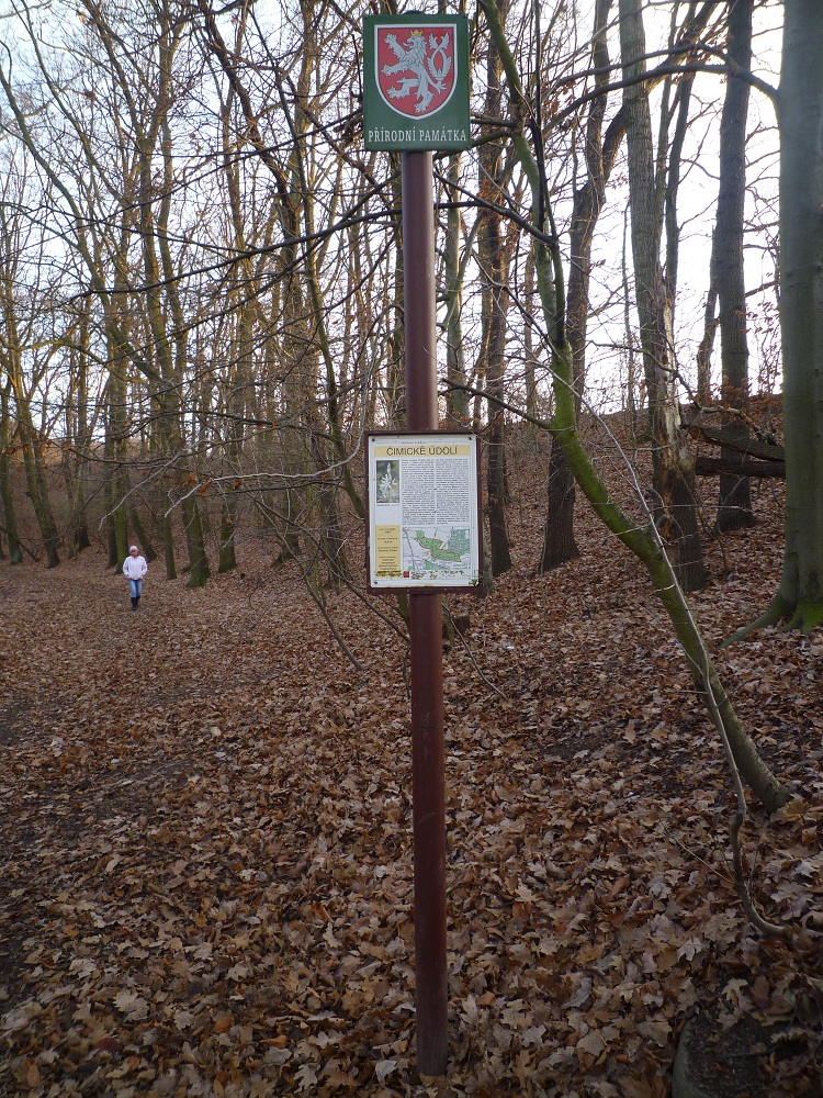 Pohled na přírodní památku ze západní strany. Přírodní památka Čimické údolí, Praha.